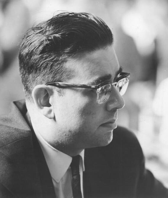 Oberstes Gericht, Globke-Prozess, Prozessbeobachter Zentralbild Stöhr-20.7.1963 Berlin: Globke-Prozeß vor dem Obersten Gericht der DDR - Plädoyer der Verteidigung. Mit dem Plädoyer der Verteidigung wurde am 20. Juli 1963, dem vorletzten Prozeßtag, die Hauptverhandlung gegen Globke vor dem Obersten Gericht der DDR fortgesetzt. UBz: Unter den Prozeßbeobachtern, Rechtsanwalt Herbert Gumpler (Finnland).